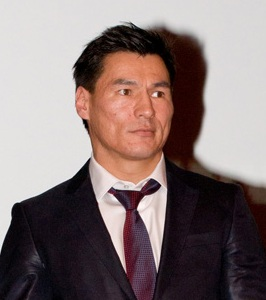 Бату Хасиков на премьере фильма "Бой с тенью 3" 11 ноября 2011